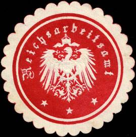 Sealing stamp Title: Reicharbeitsamt Description: rot, weiss, geprägt Place: size: 4 cm